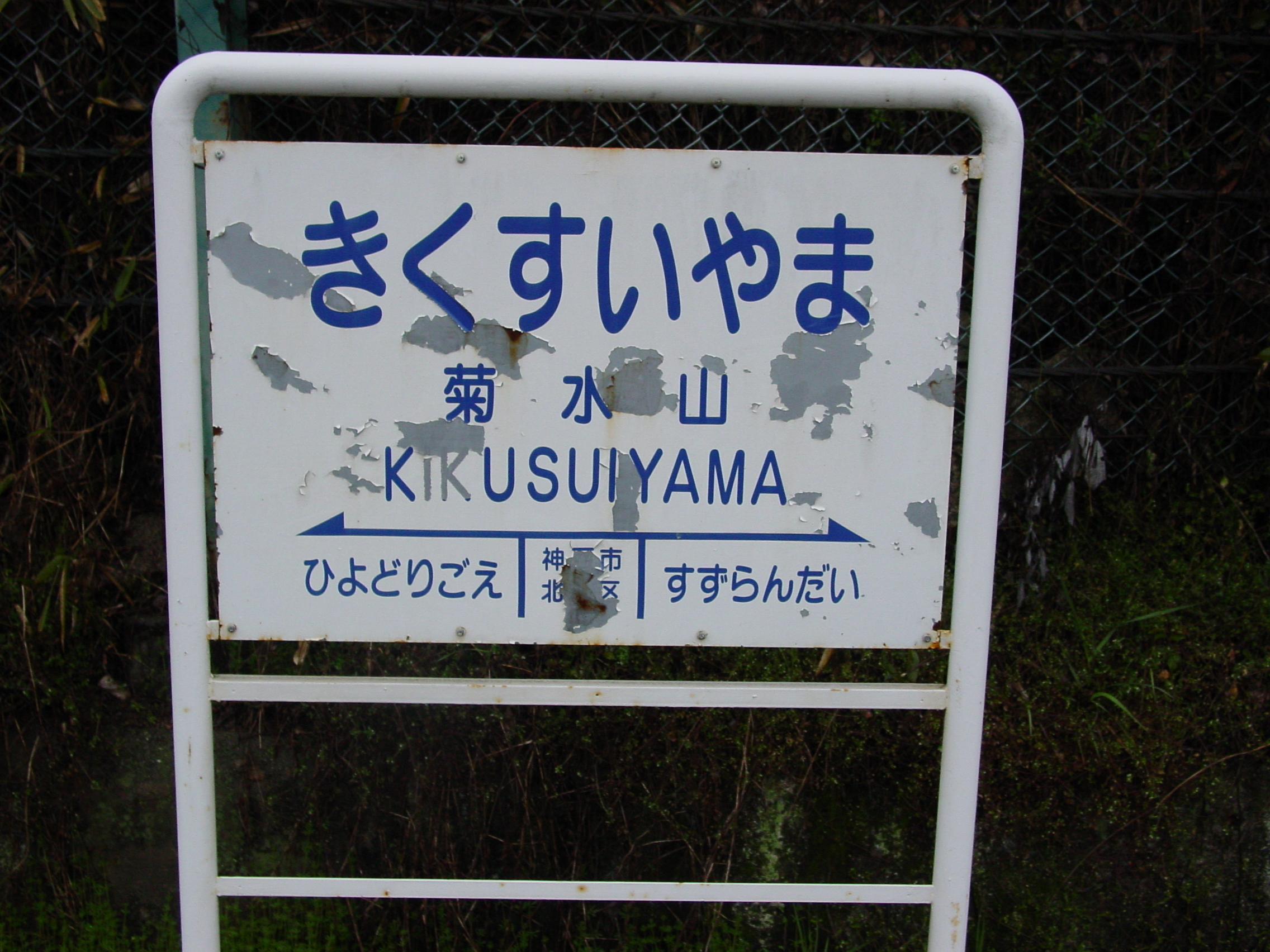 菊水山駅駅名票